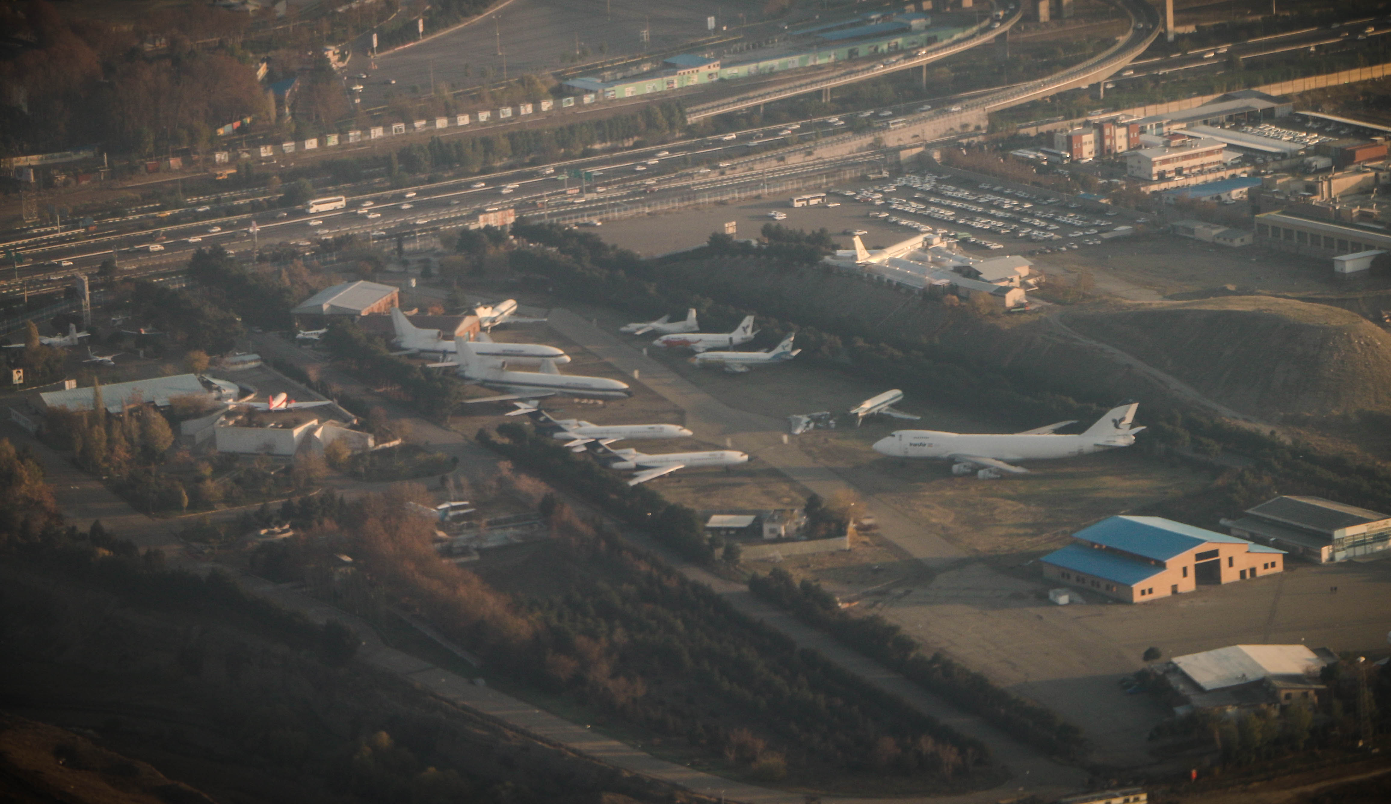 نمایی از یکی از پارکینگ‌های هواپیماهای از کار افتاده فرودگاه مهرآباد ۱۳۹۷